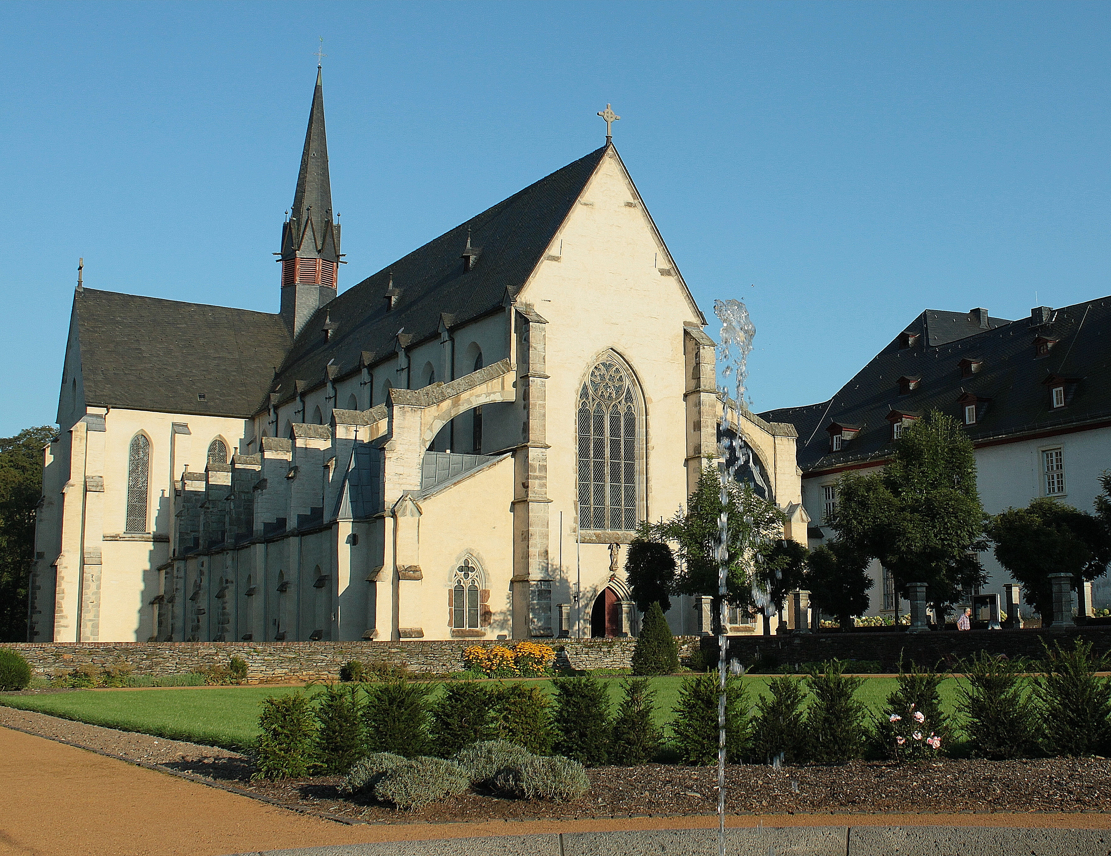 Klosteranlage der Zisterzienserabtei aus Kirche, Kreuzgang, Klostergebäuden und Pfortenhaus; frühgotische Basilika; neu angelegter Barockgarten